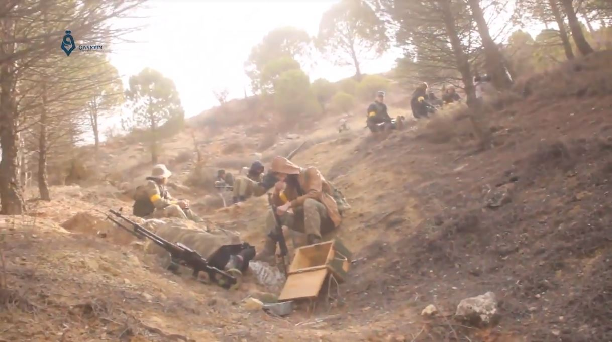 Rebelles de l'Armée syrienne libre lors de l'offensive d'Afrine contre les Kurdes des YPG, 25 janvier 2018.